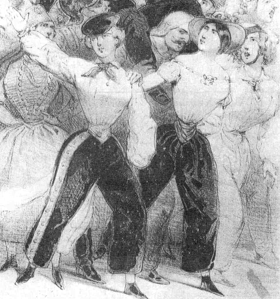 Détail d'une gravure figurant un cortège portant en triomphe Philippe Musard au bal de l'Opéra, à Paris (scène du Carnaval de Paris).